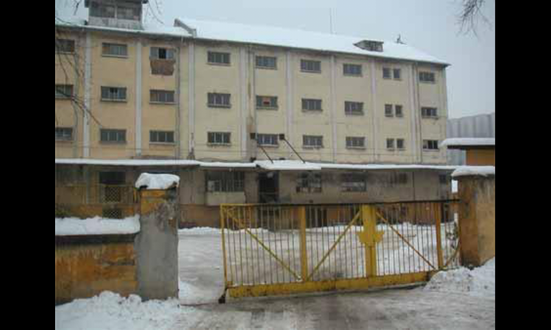 Все още не-изоставена